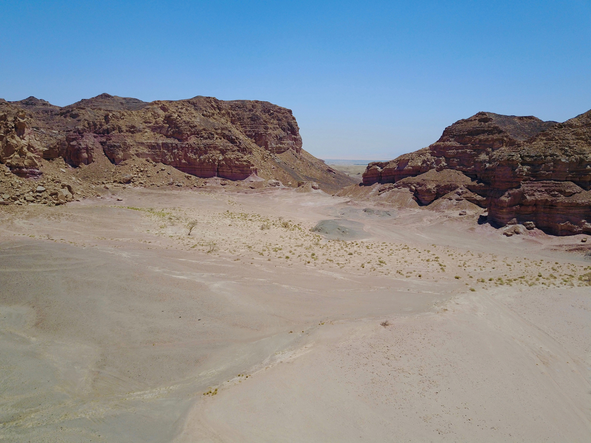 . עמק ססגון שוכן בצפון מזרח בקעת תמנע כ-25 ק"מ מצפון לאילת. על העמק מתנהל מאבק כנגד בניית מתחם מלונות גדול. בתמונה: חלקו המערבי של עמק ססגון, מבט מדרום (צילום מרחפן), ממול- הר מכרות, מימין- גבעה מצוקית ללא שם. בינהן אוכף נמוך המקשר בין שתי הבקעות. שתי הגבעות בנויות מאבני חול מתצורות נטפים ושחורת.